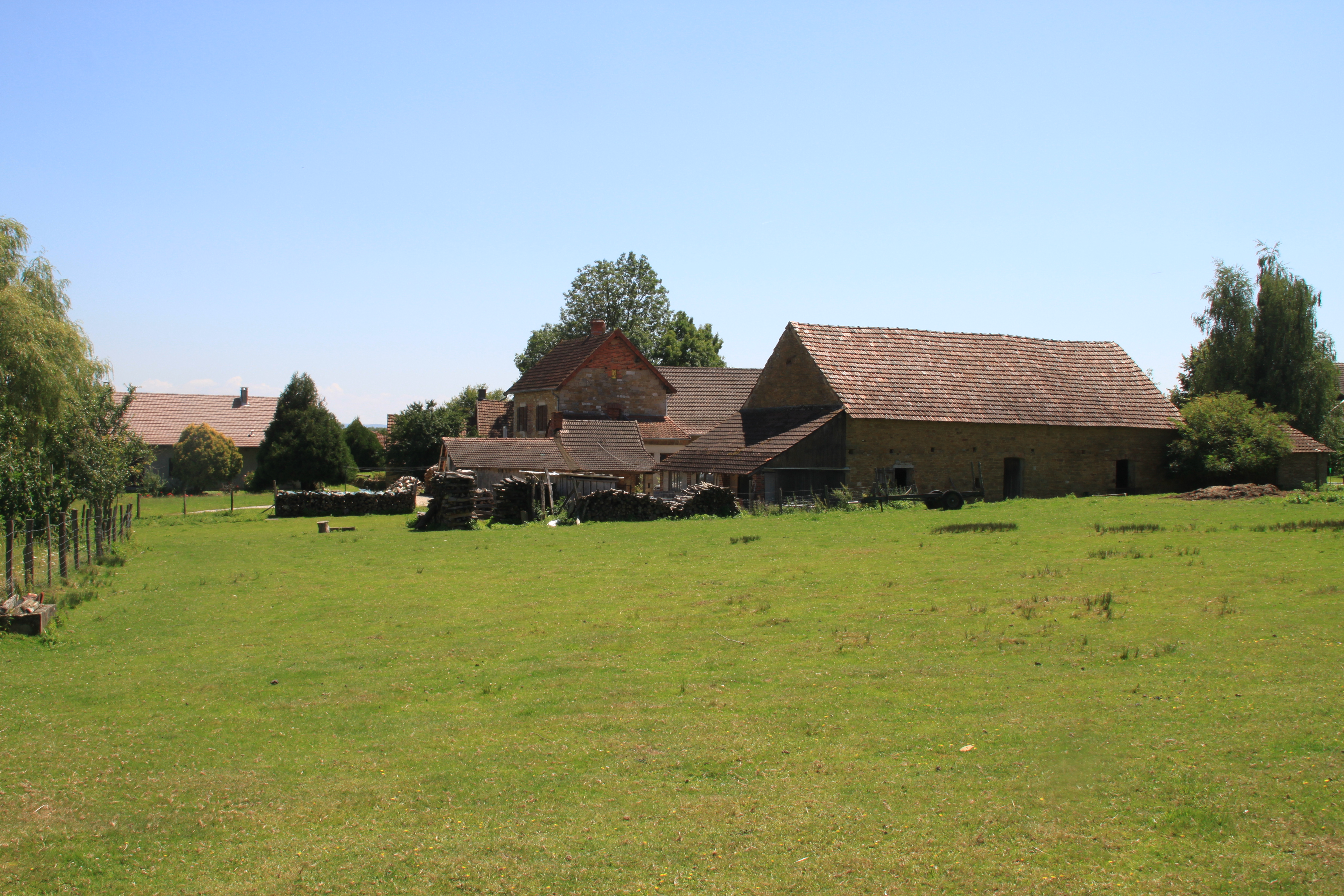 Beauvernois (Saône-et-Loire) Bauernhaus im Dorf